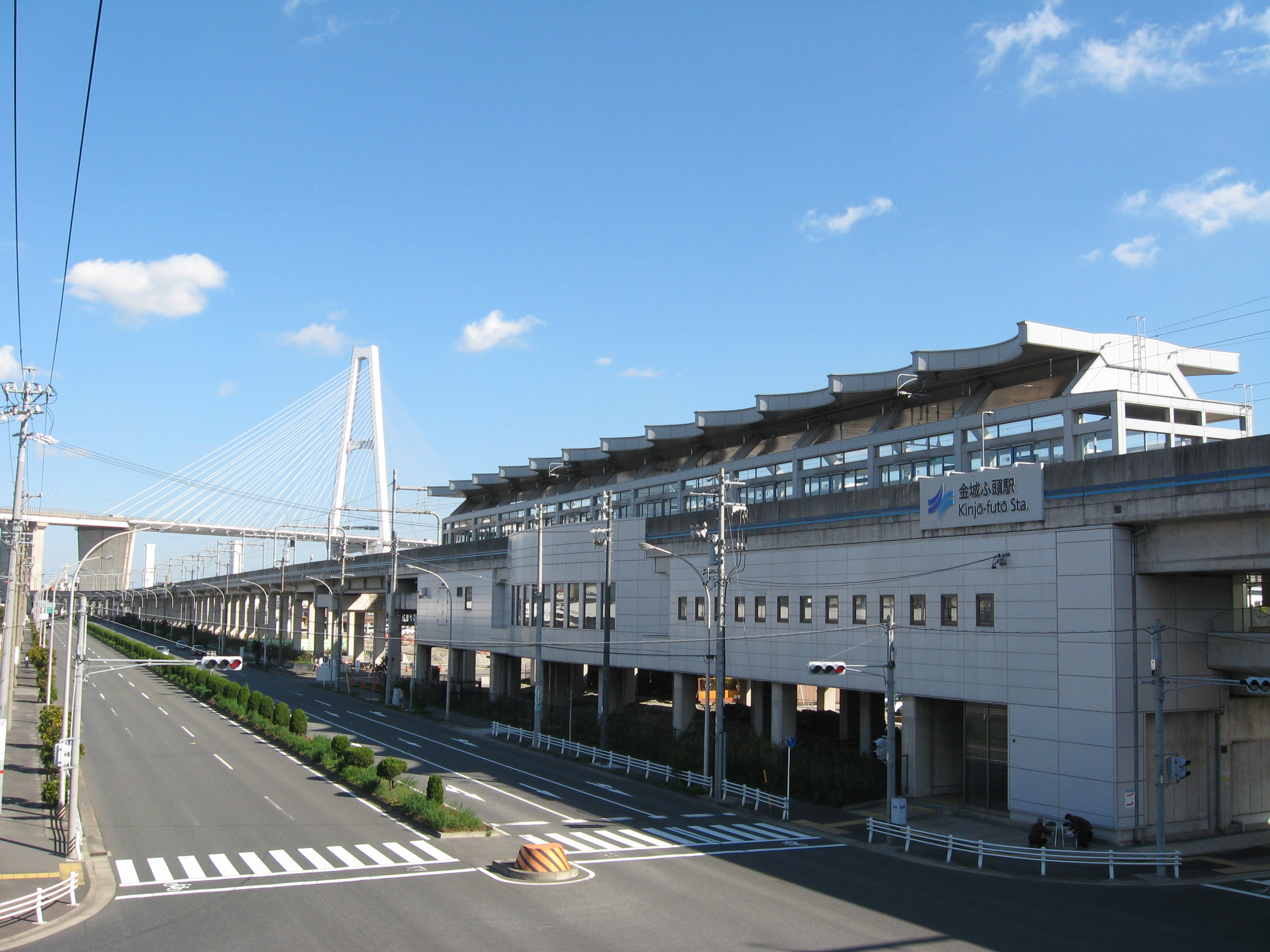 金城ふ頭駅